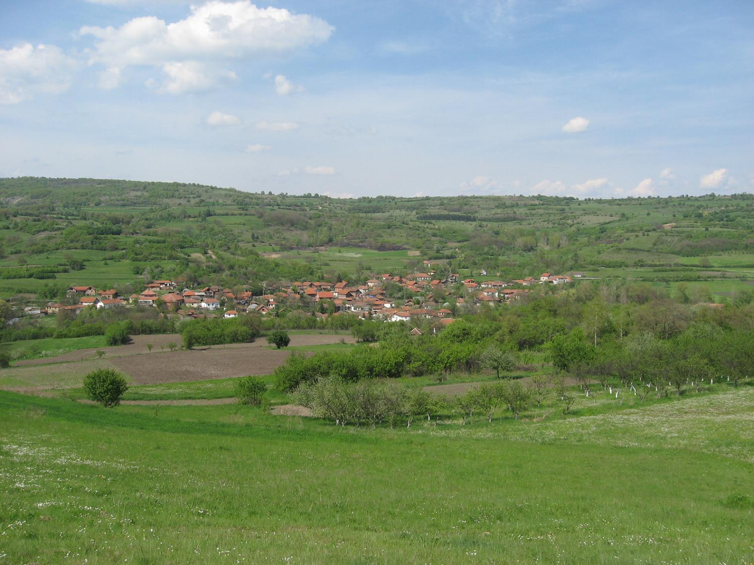 Сопствена слика, Драган Цветковић. Слика села са Јеремијиног брда (Шанац).